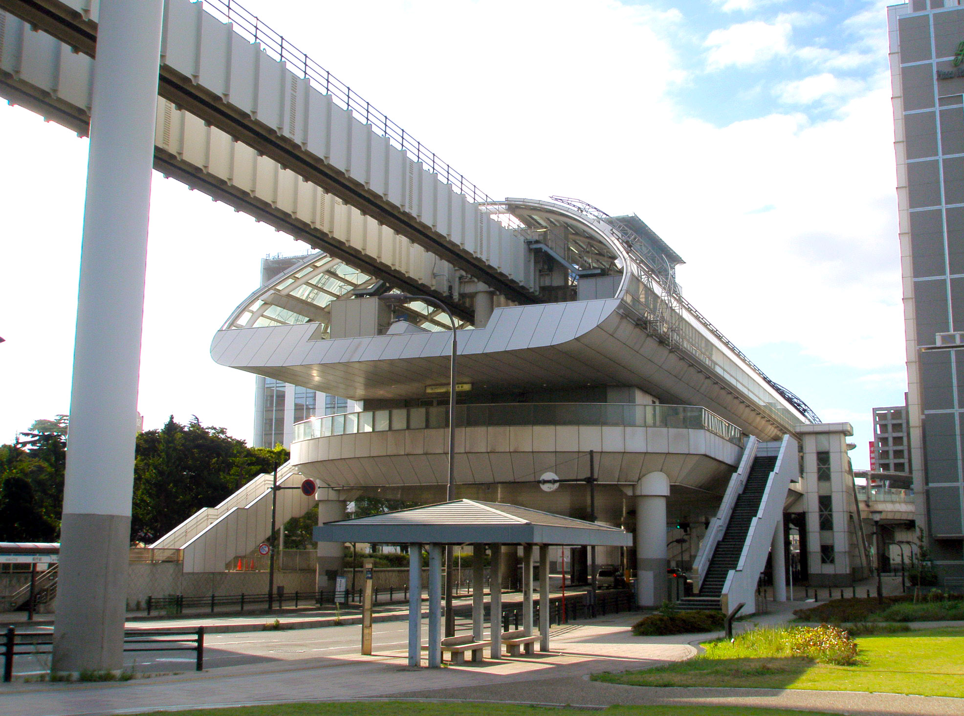 千葉都市モノレール県庁前駅